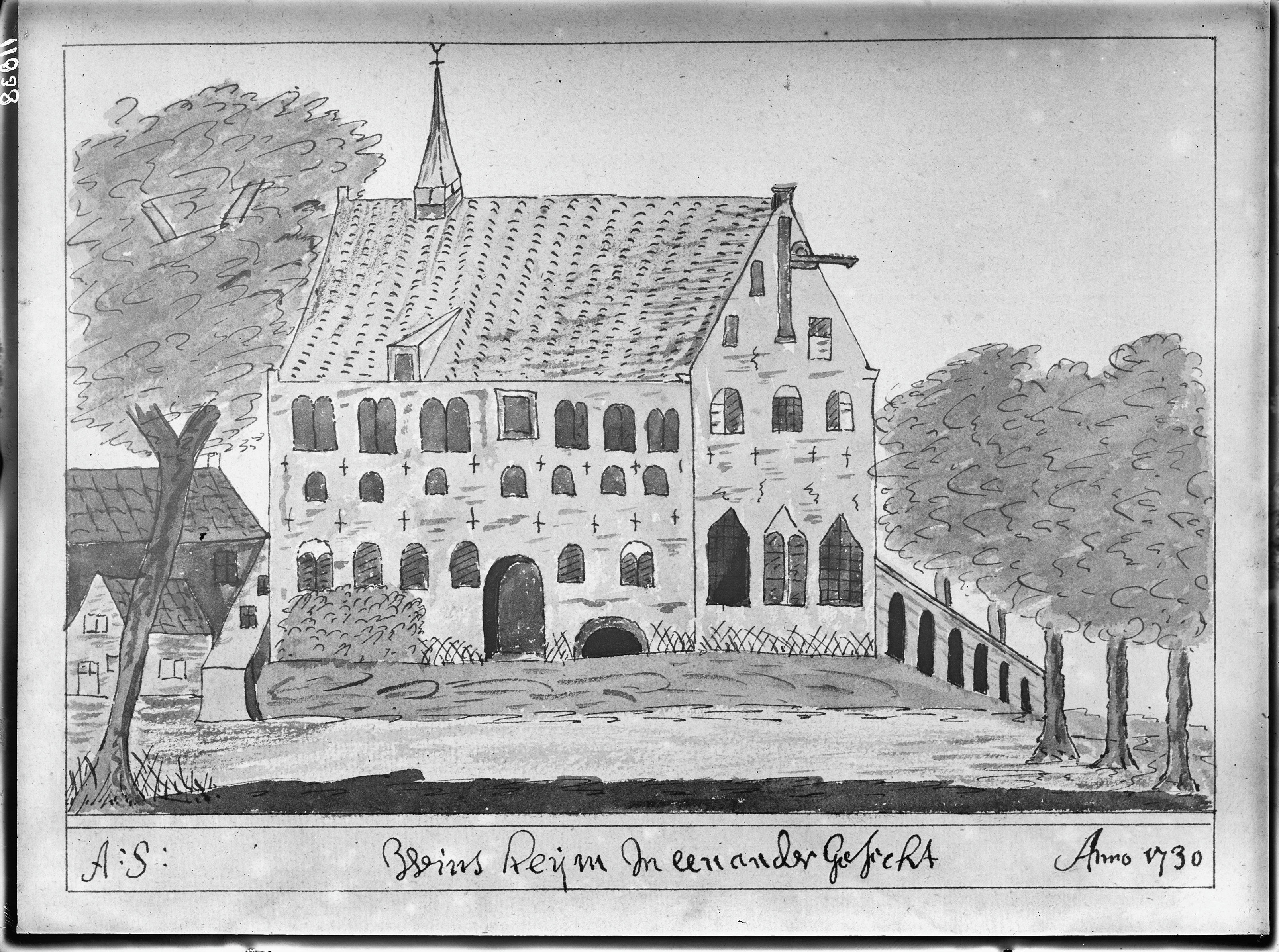 Klooster: voormalige klooster naar 2 tekeningen van A.Schoemaker in het Museum te Zwolle